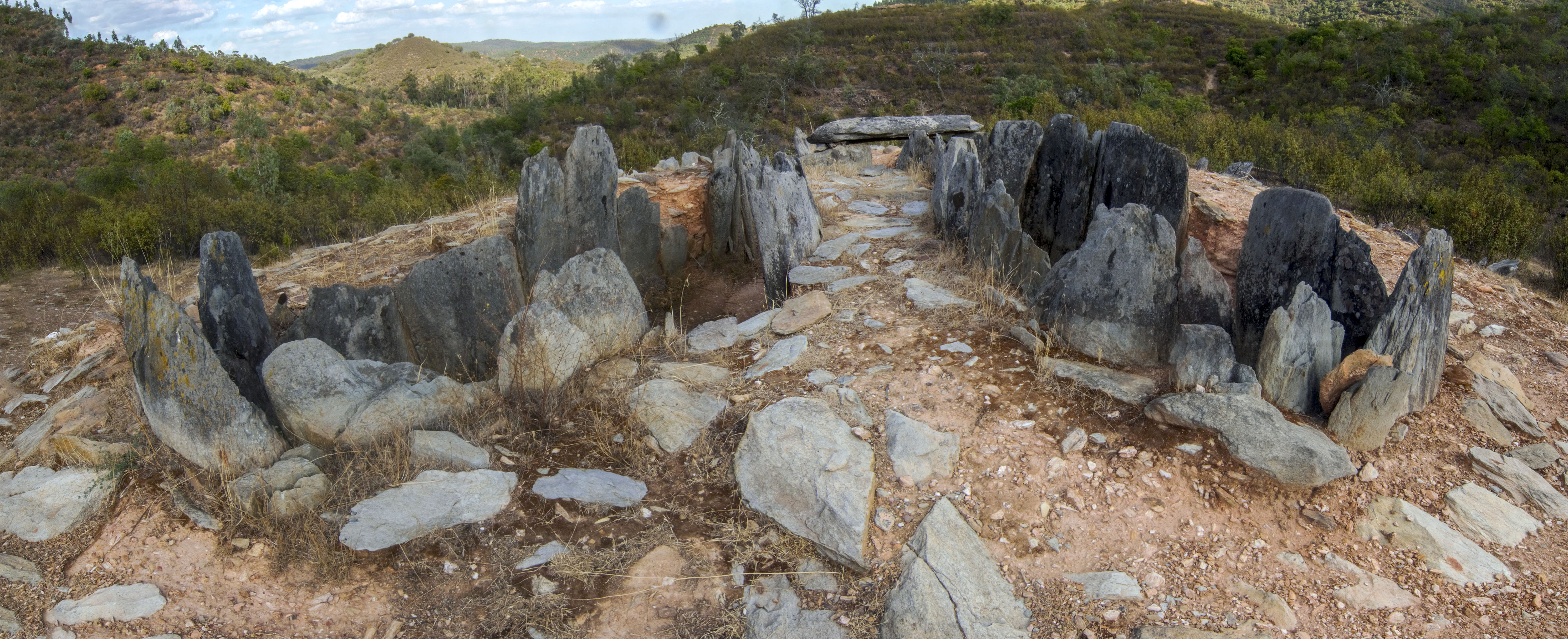 El Pozuelo, Zalamea la Real, Huelva.